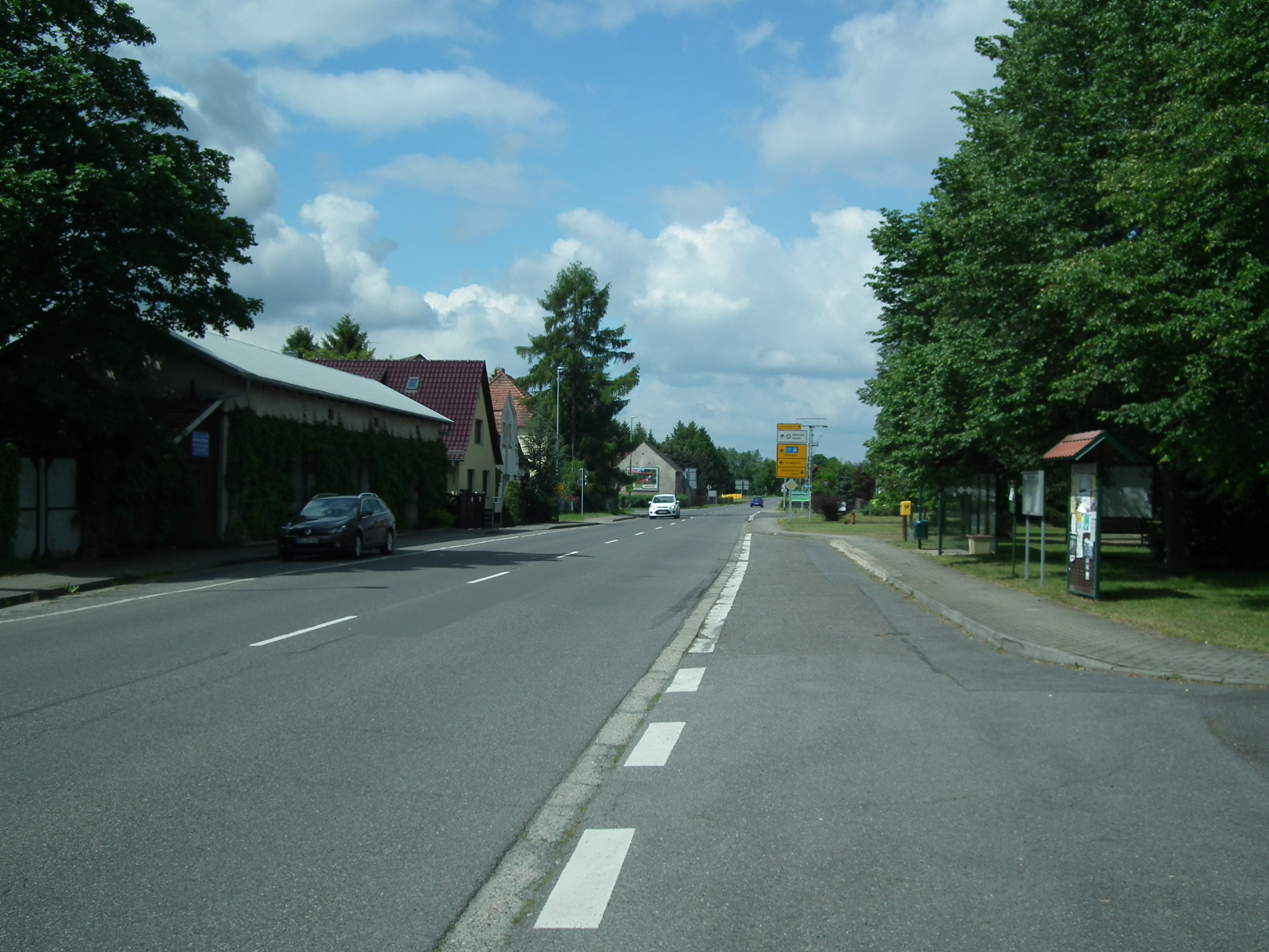 Grünewald, Guteborner Straße von der Hauptstraße, Ecke Hocenbockaer Straße